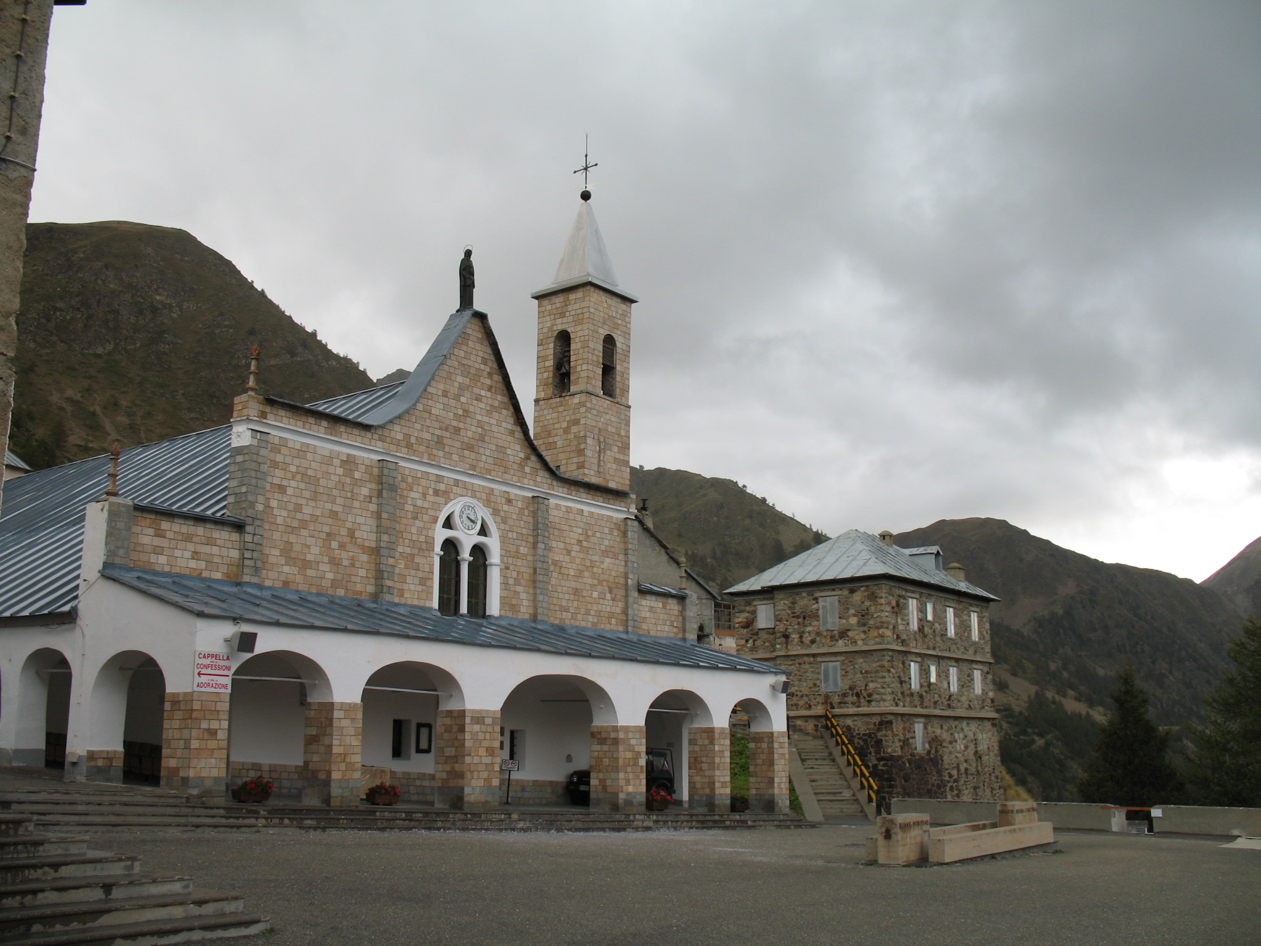 Immagine da Vinadio, valle Stura di Demonte, in provincia di Cuneo, Piemonte, Italia